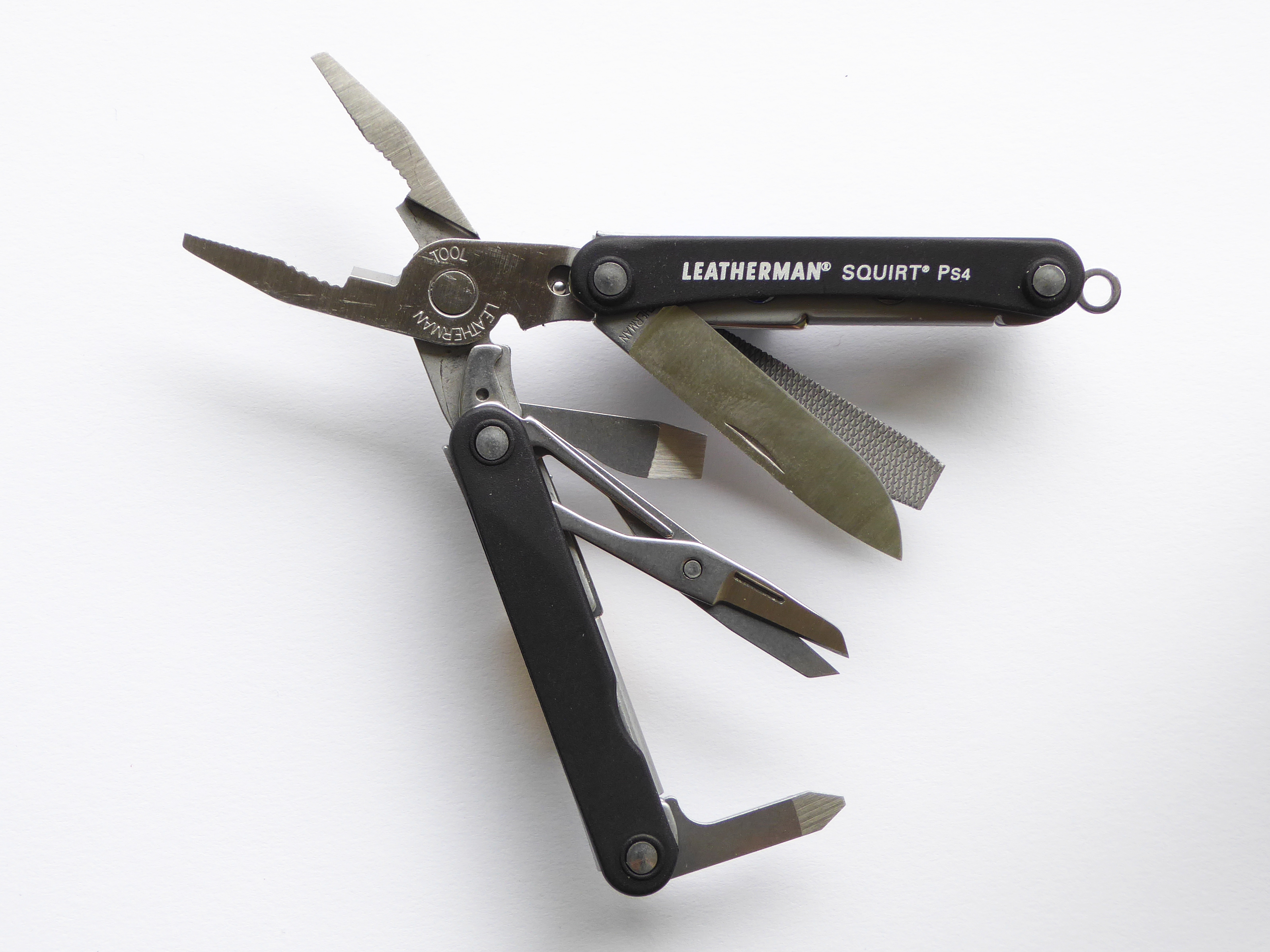 Litet multiverktyg av fabrikat Leatherman Squirt PS4. Längd hopfälld: 57.2 mm Vikt: 56.4 gram Antal verktyg: 9 stycken